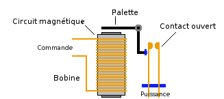 Schéma d'un relais électromagnétique